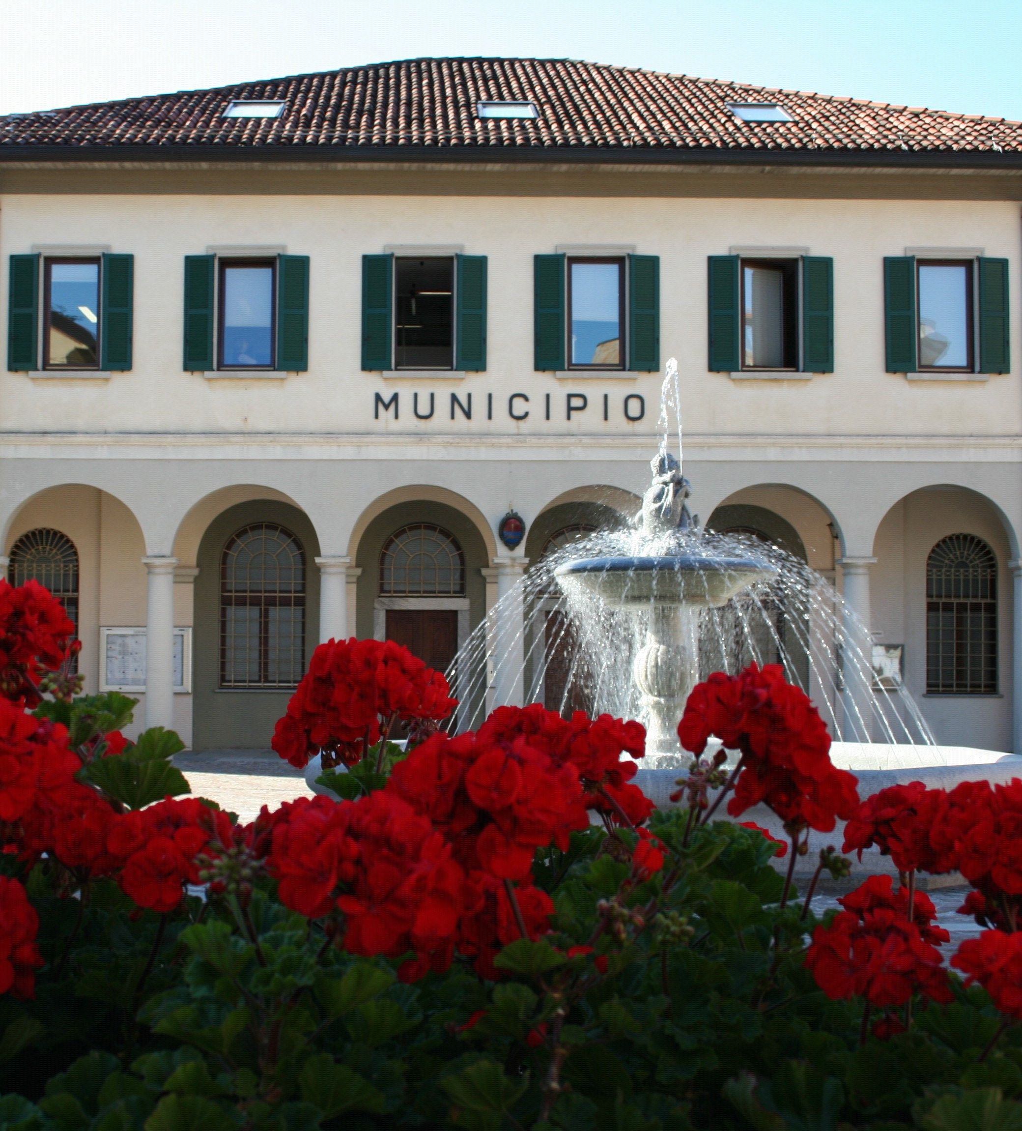 Il Municipio in primavera